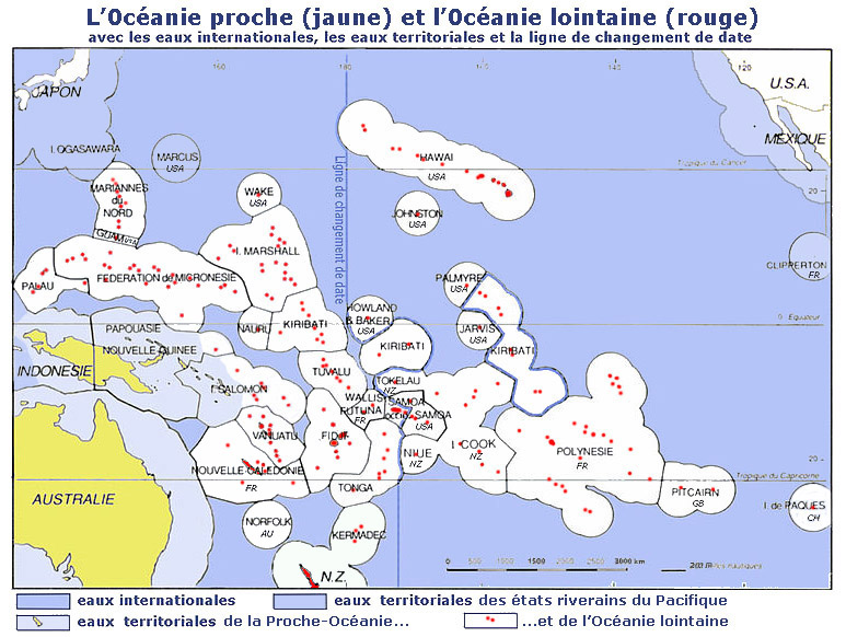 Carte de l'Océanie proche et de l'Océanie lointaine